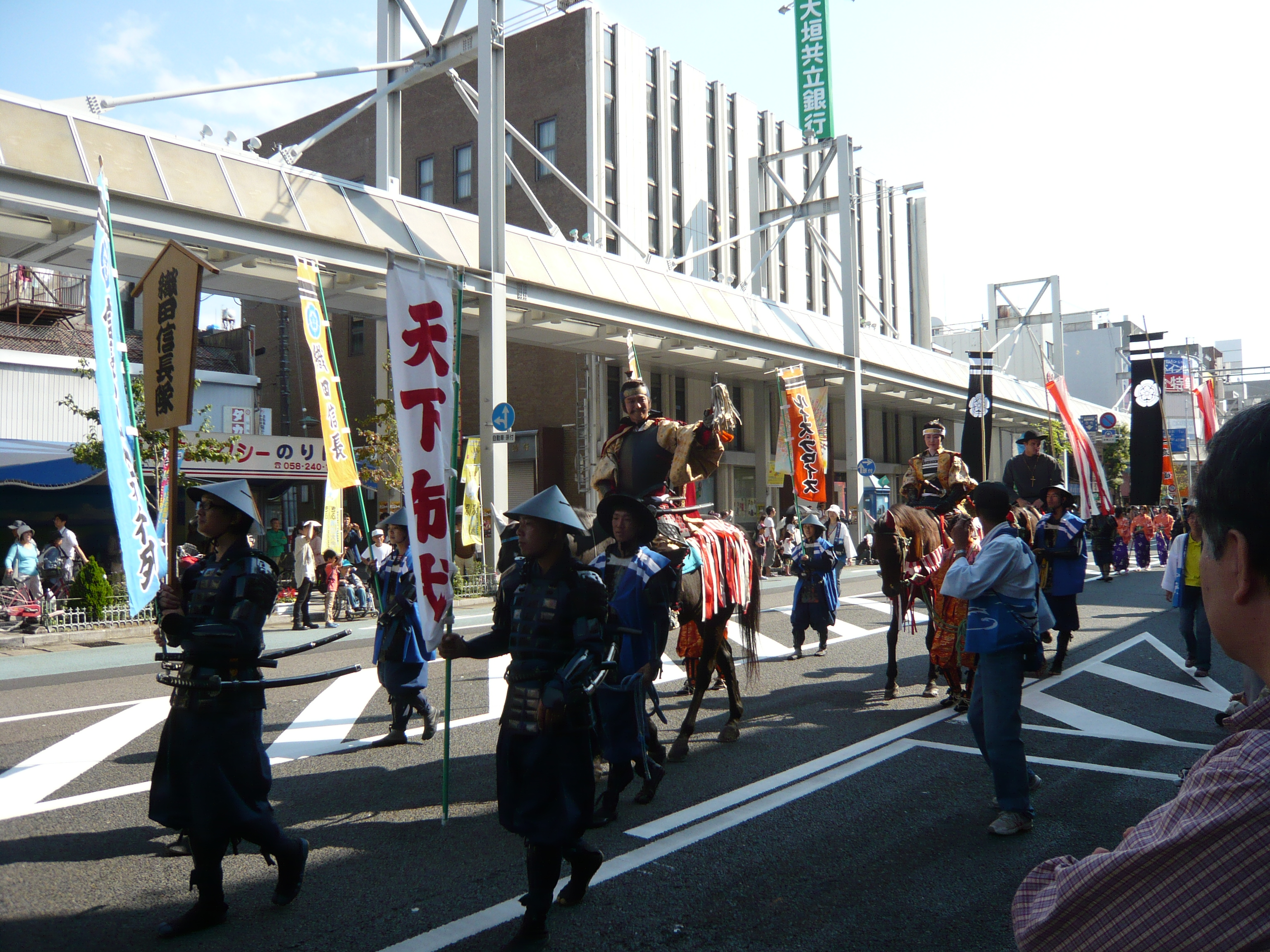 岐阜信長祭りの武者行列。2012年10月7日。